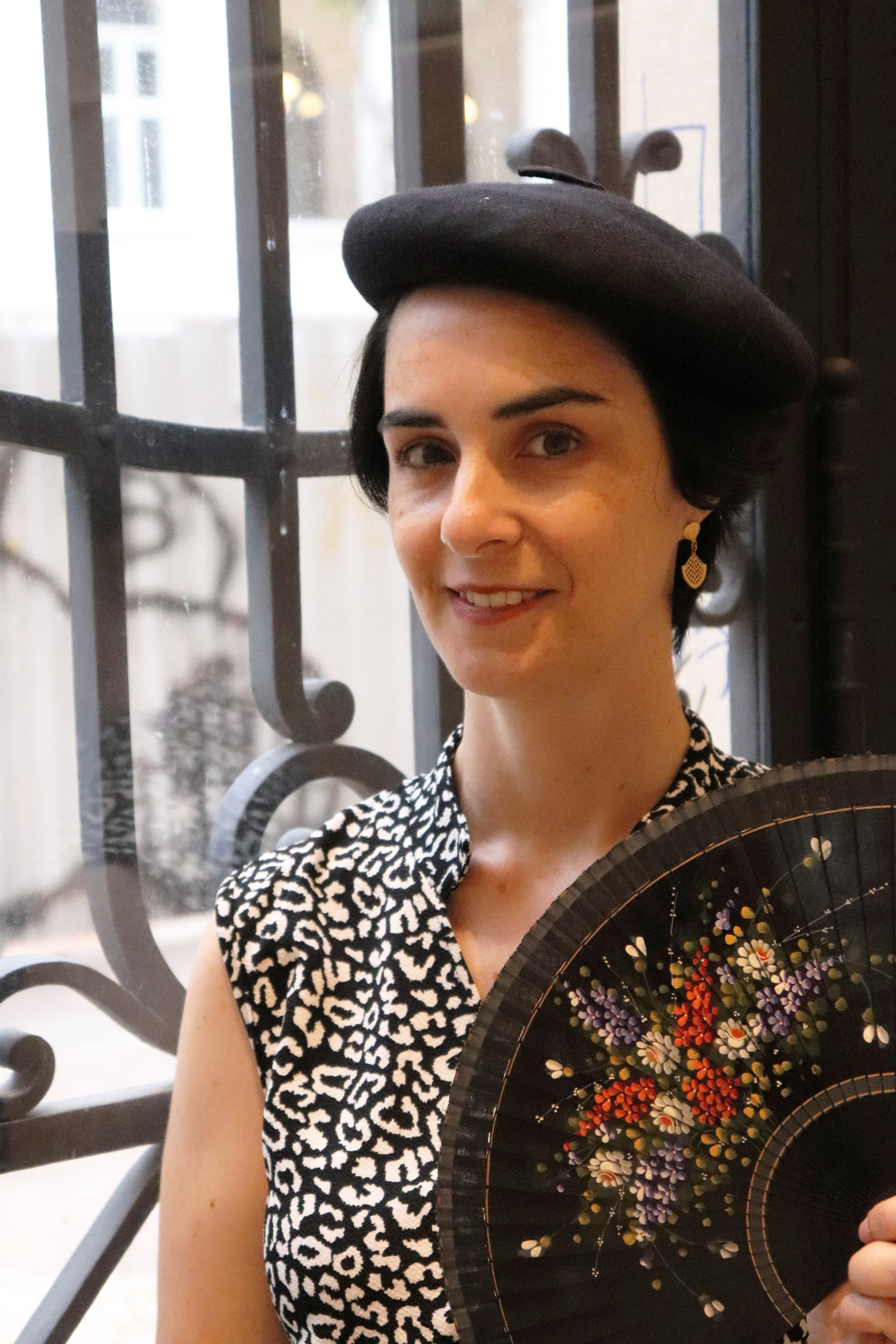 foto thais matarazzo